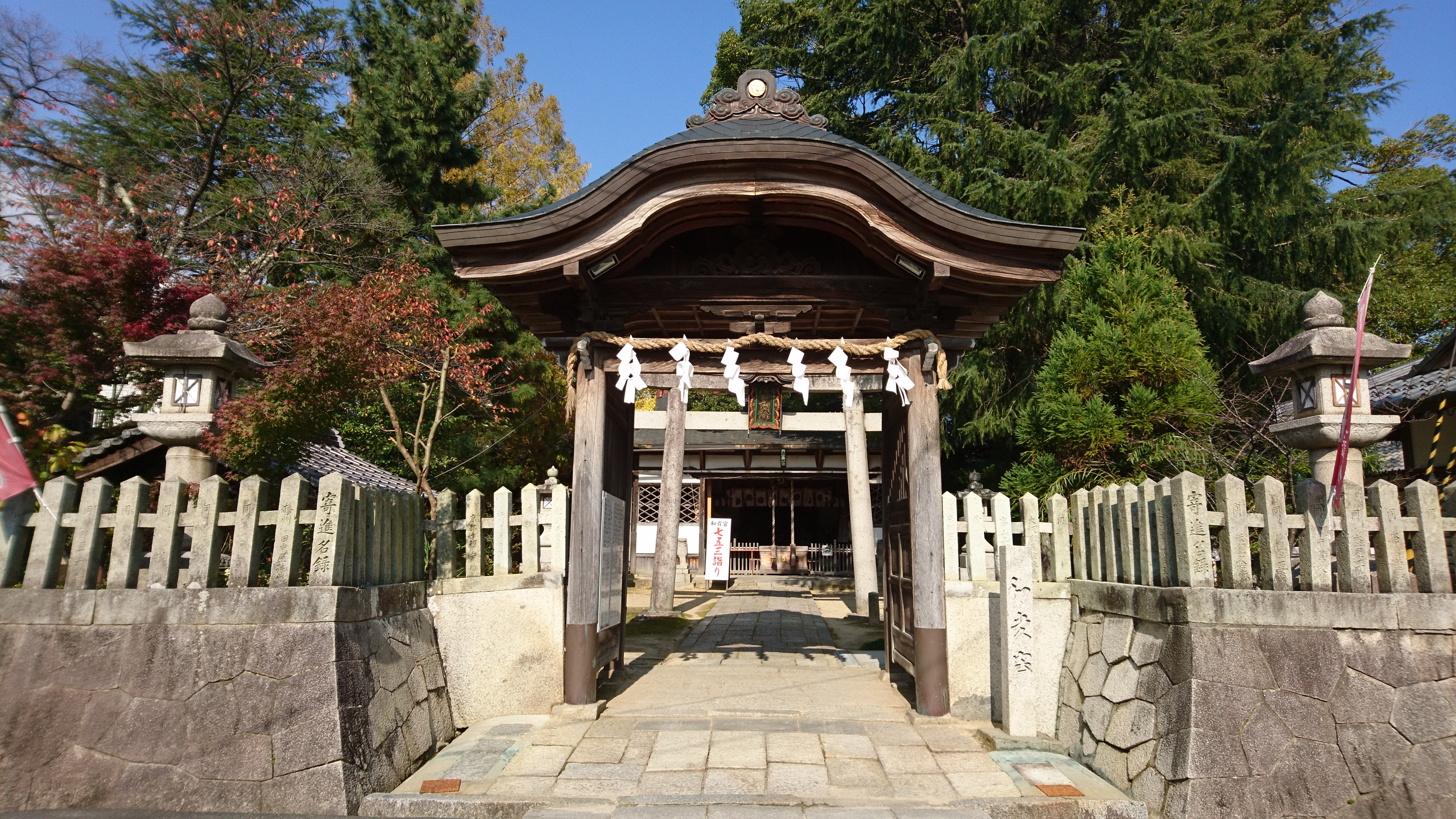 宮津市 和貴宮神社の表門